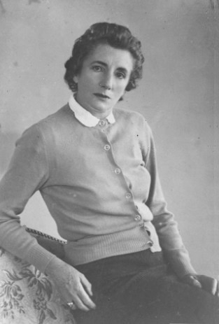 Dolores Gangotena y Jijón, esposa del presidente ecuatoriano Camilo Ponce Enríquez y por tanto primera dama de ese país entre 1956 y 1960. La imagen fue captada por el estudio fotográfico Almeida JR, alrededor del año 1950.